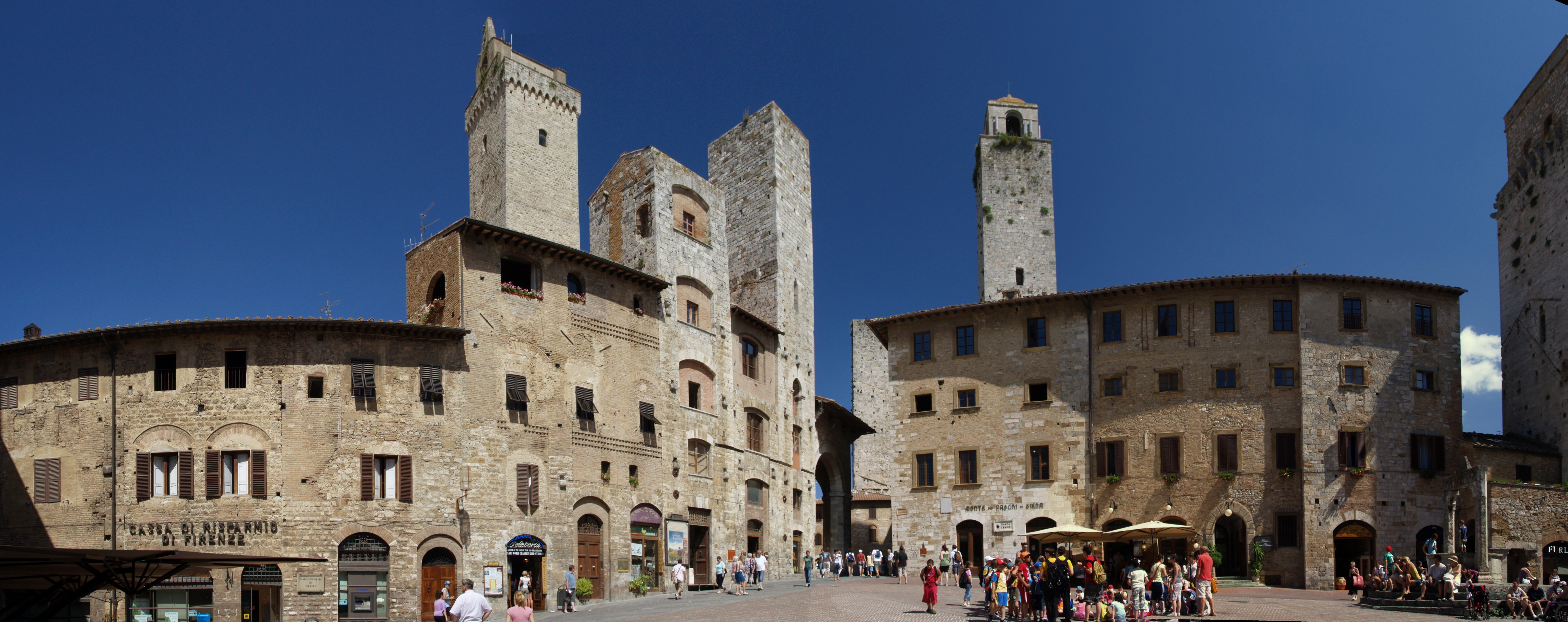 San Gimignano